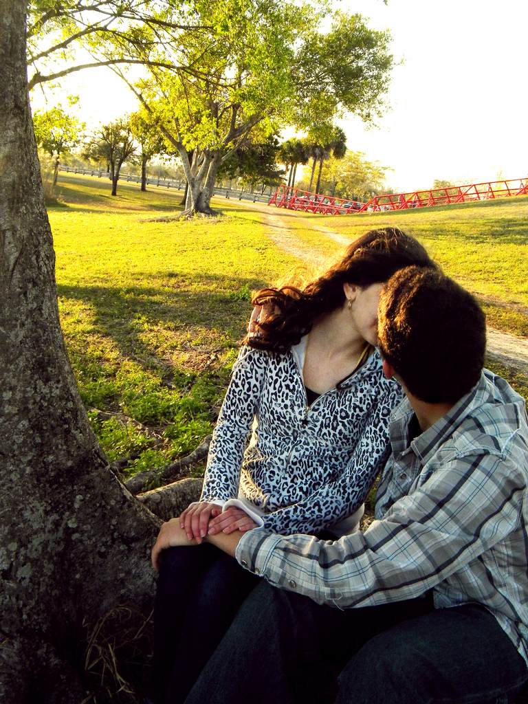 Just love...